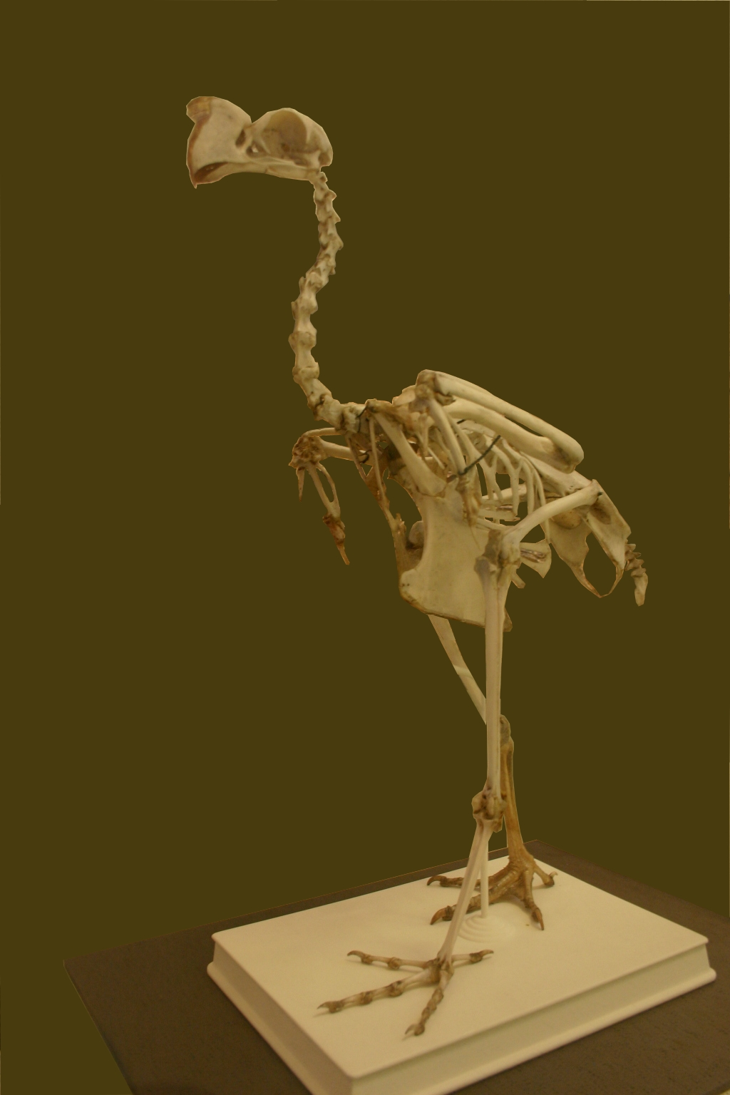 Visit my blog at